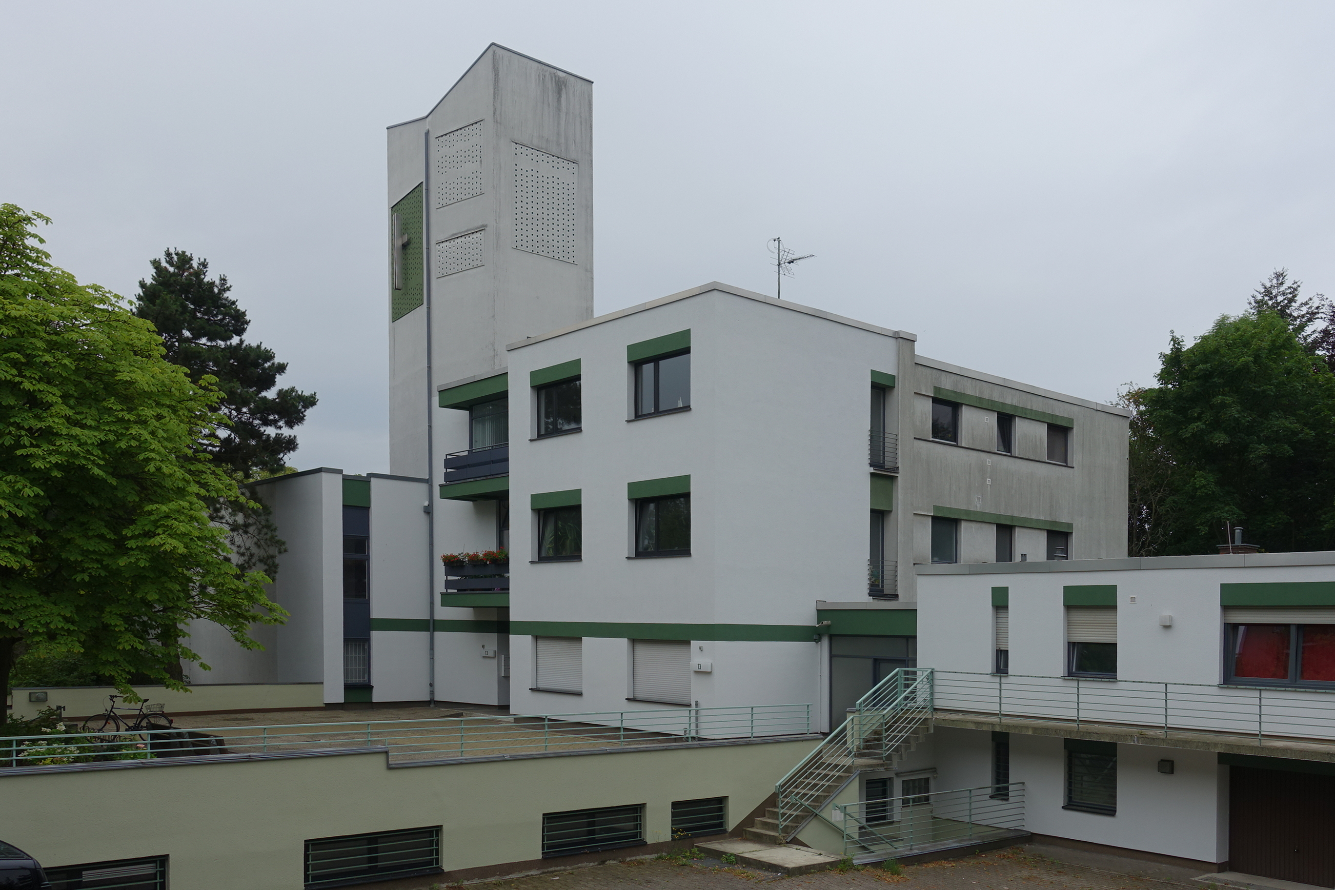 Gebäudekomplex aus Kirche mit Turm, Jugendheim und Wohnhaus des Pfarrers